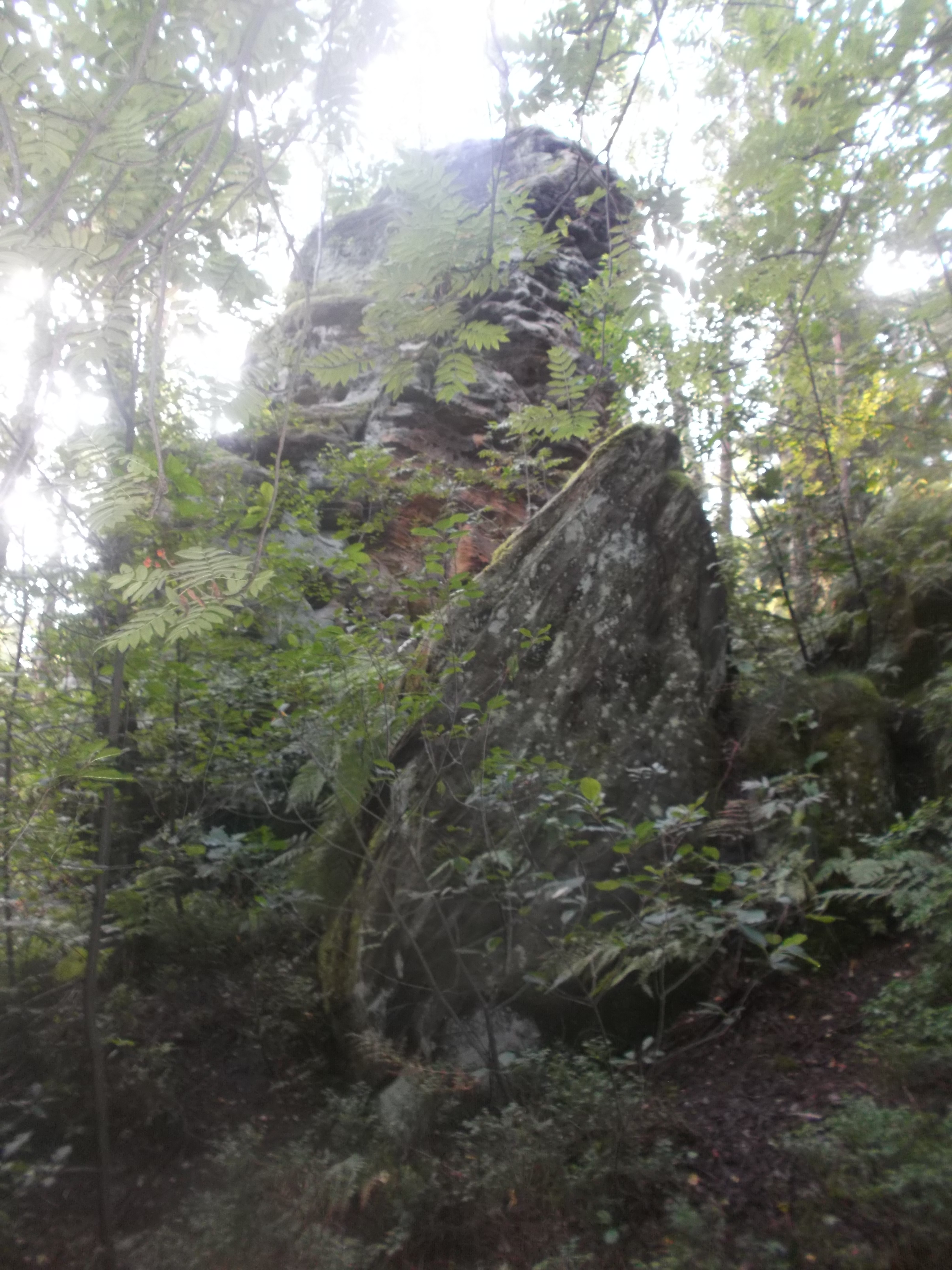 Altar-Felsen am Stein-Berg